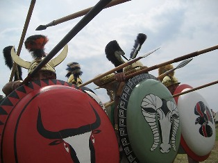 Phalange étrusque reconstitutée par l'association Pax Augusta à Lattes